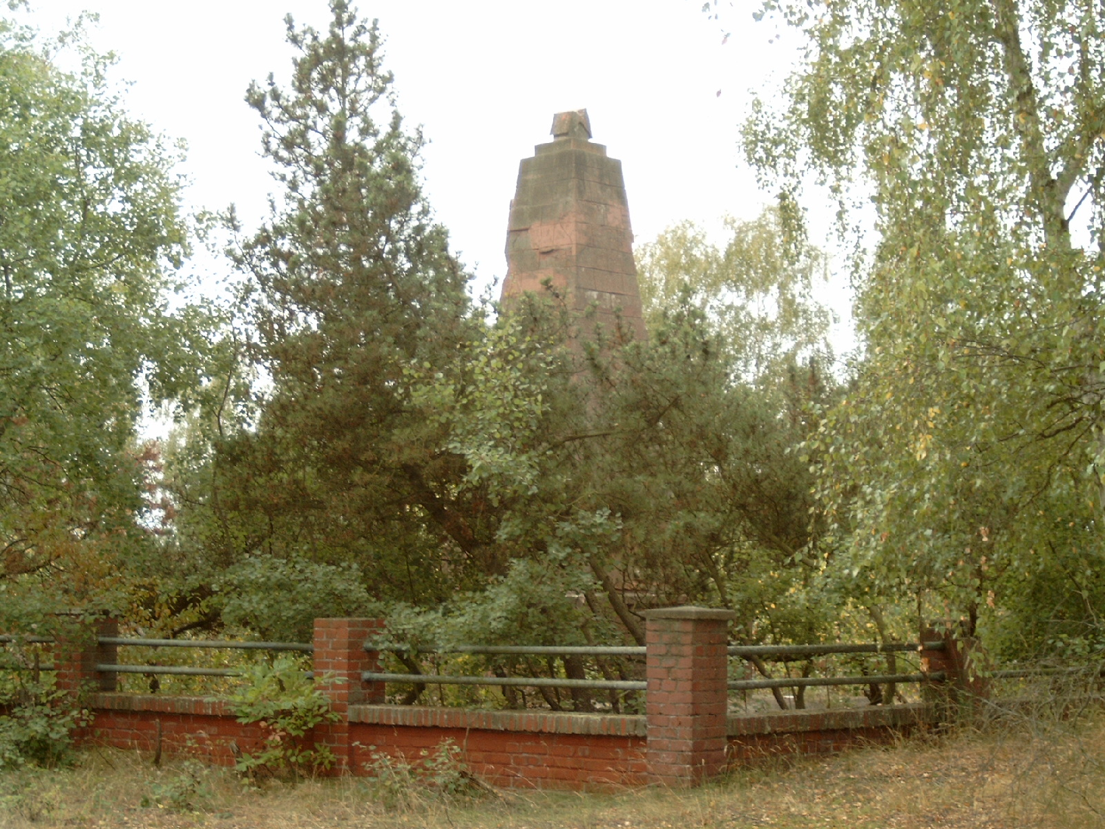 Halbinsel Wusterau: sowjetisches Ehrenmal.